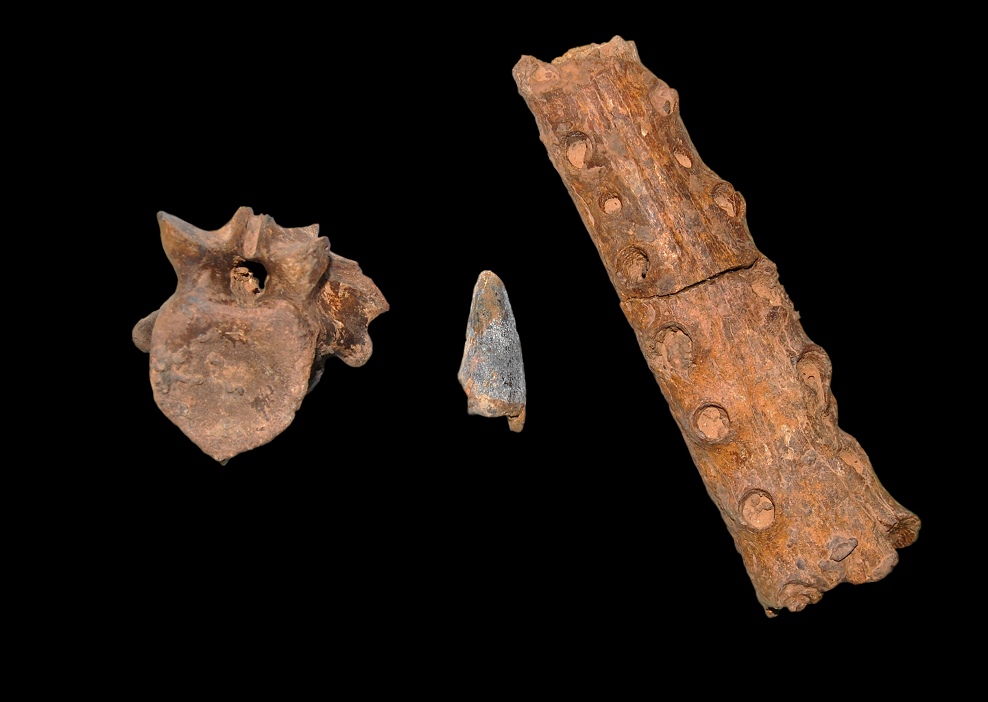 Museo civico di storia naturale Milano